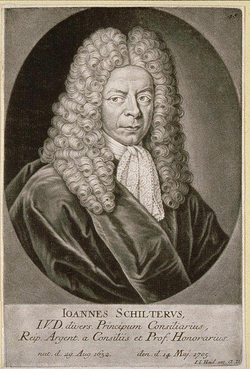 Ioannes Schilteros, I.V.D. divers. Principi Consiliarius, Reip. Argent. a Consiliis et prof. Honoriarius nat. d. 29. Aug. 1632 den. d. 14 Mai 1705. Haid, Johann Jacob ((graveur)). 1705. Bibliothèque nationale et universitaire de Strasbourg